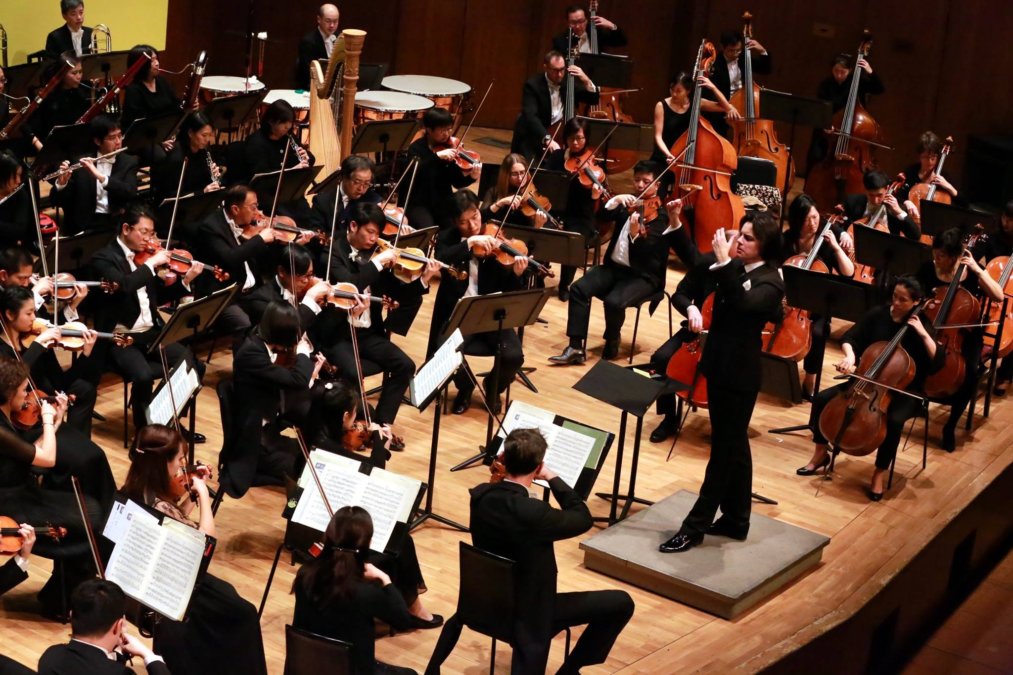 Dawid Runtz, Hongkong Sinfonietta